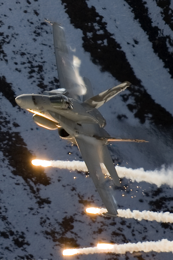 Axalp